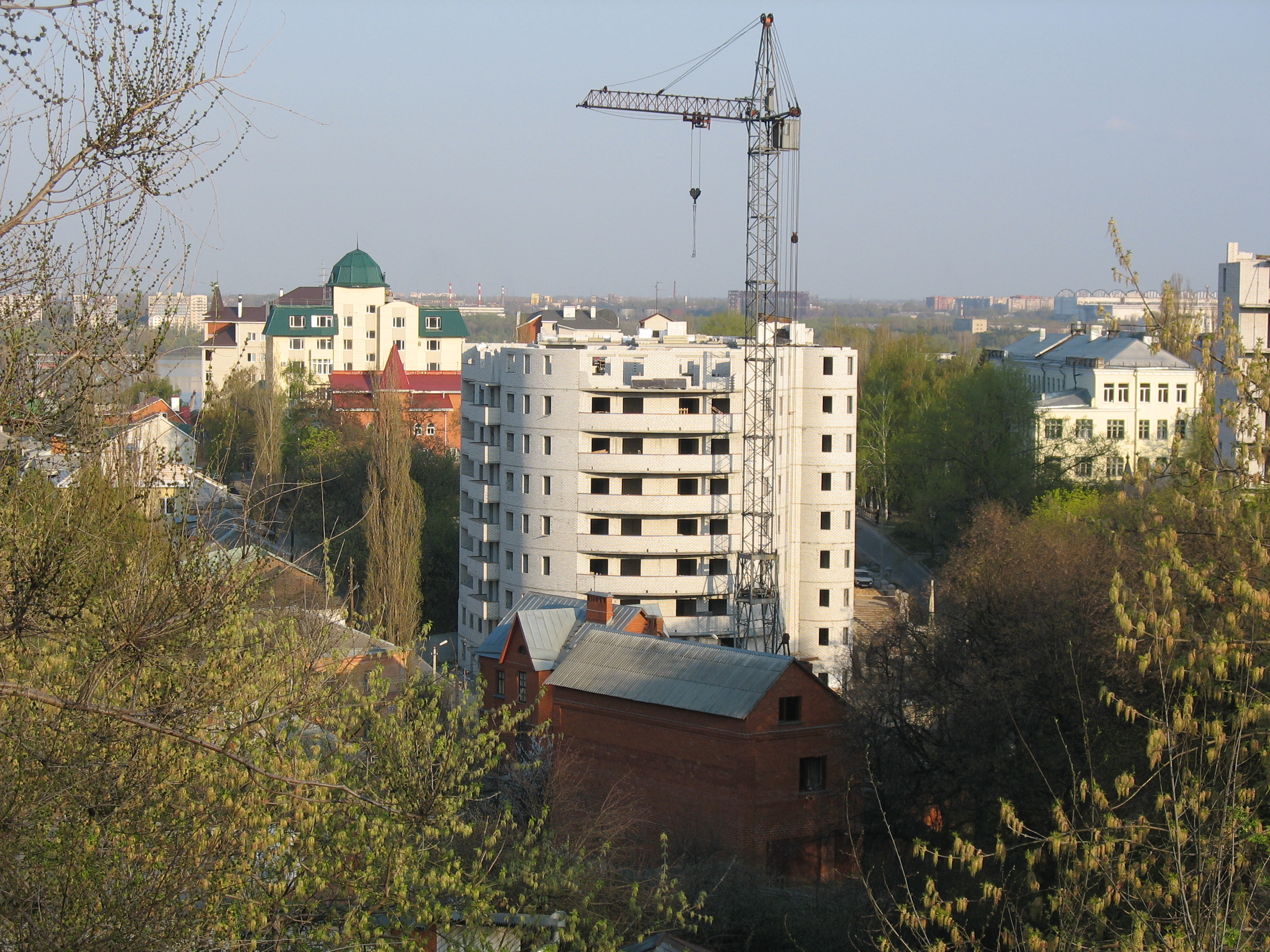 Уплотнительная застройка исторического центра города